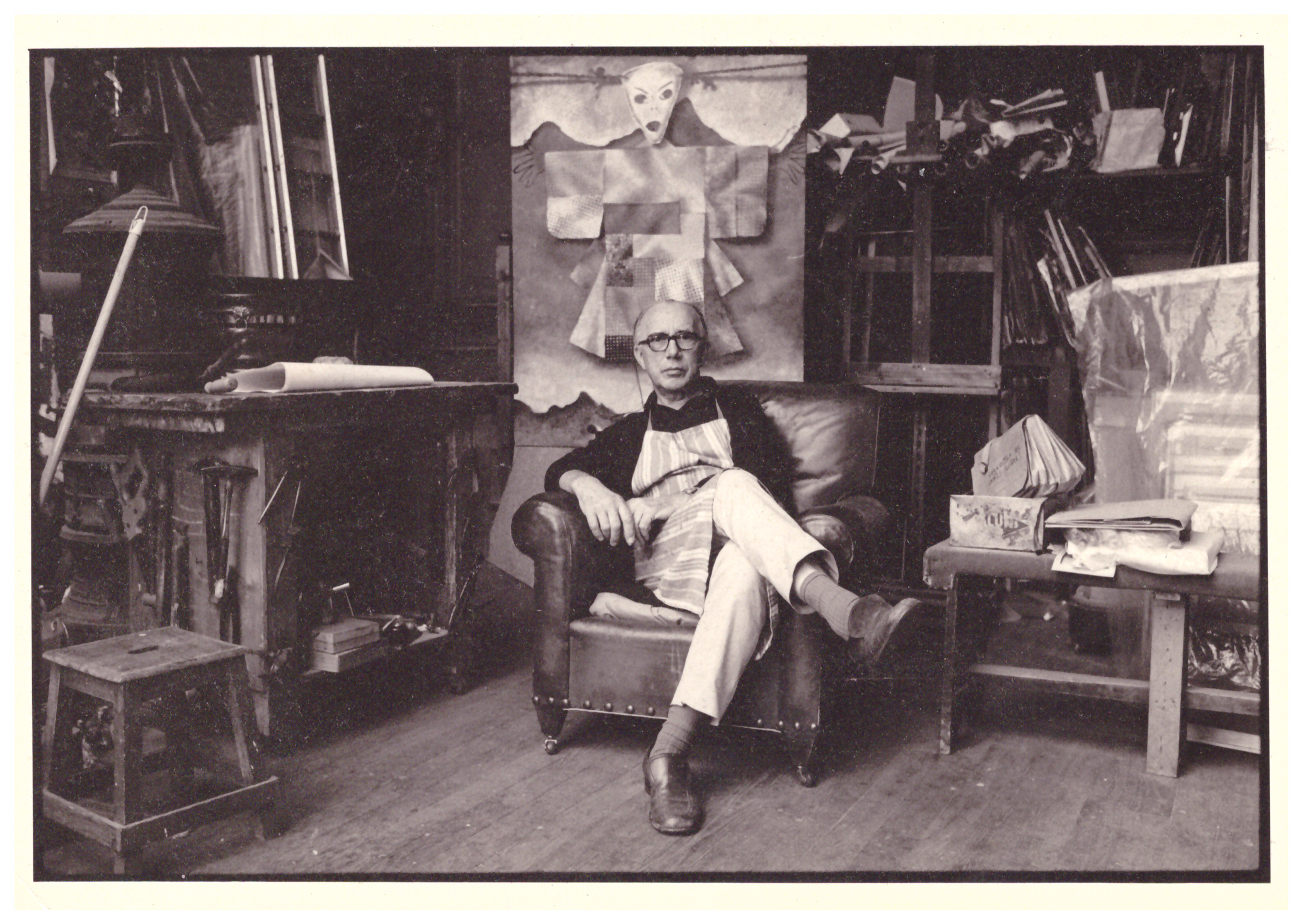 Portrait du peintre Lucien Mathelin dans son atelier de la Villa des Arts.